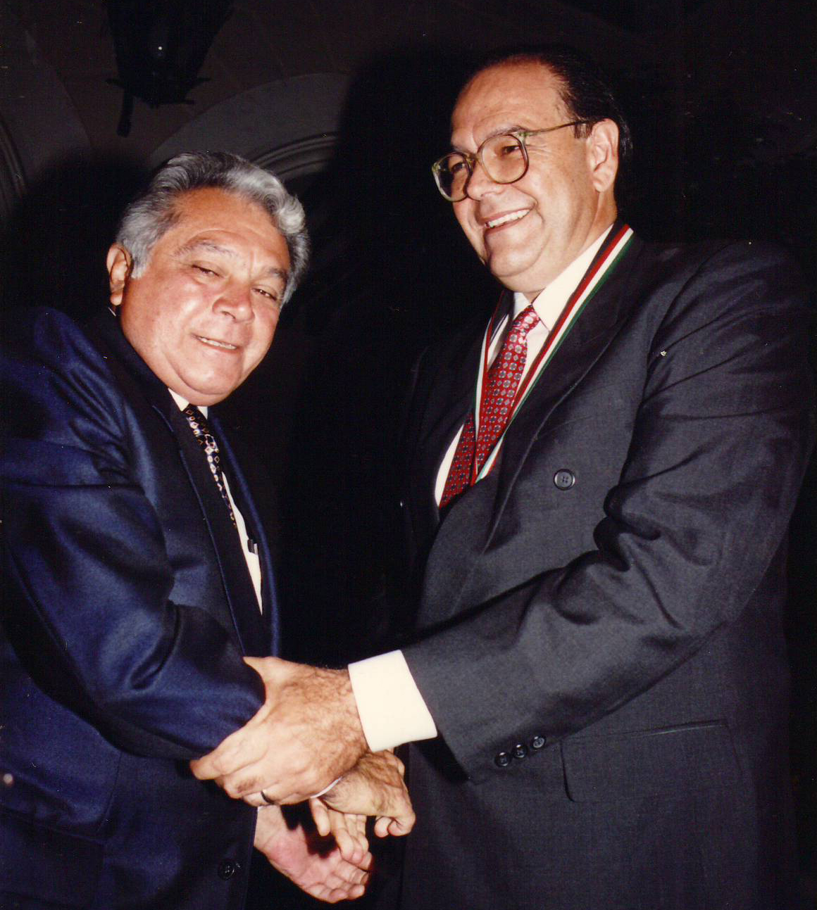 Nueva versión de una misma foto. José Luis Sierra recibiendo el premio Yucatán de manos del gobernador Víctor Cervera Pacheco. Mérida 1995